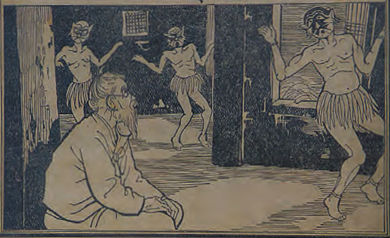 1933年